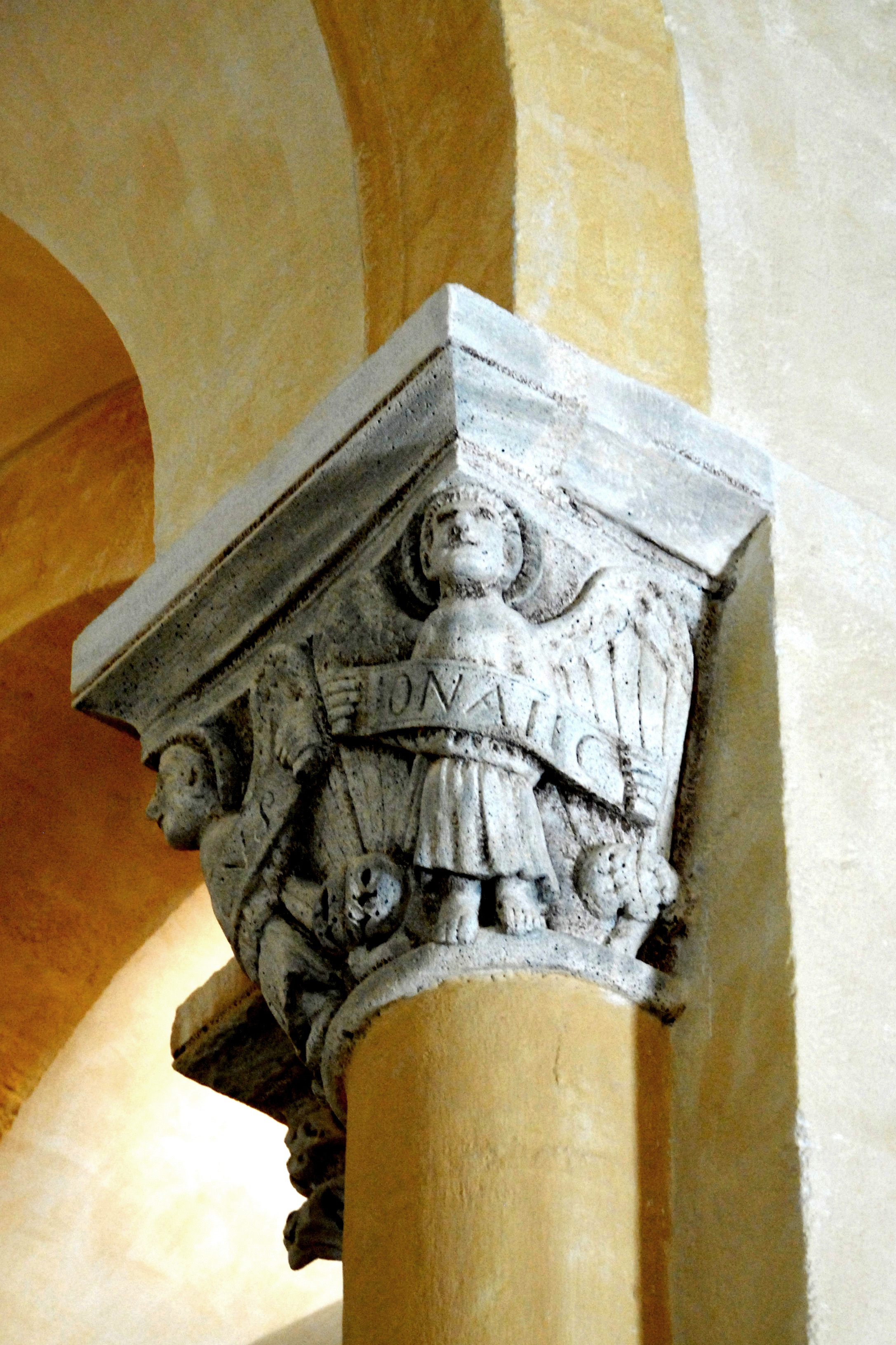 Notre-Dame du Port, Kapitell, Engel mit Schriftband